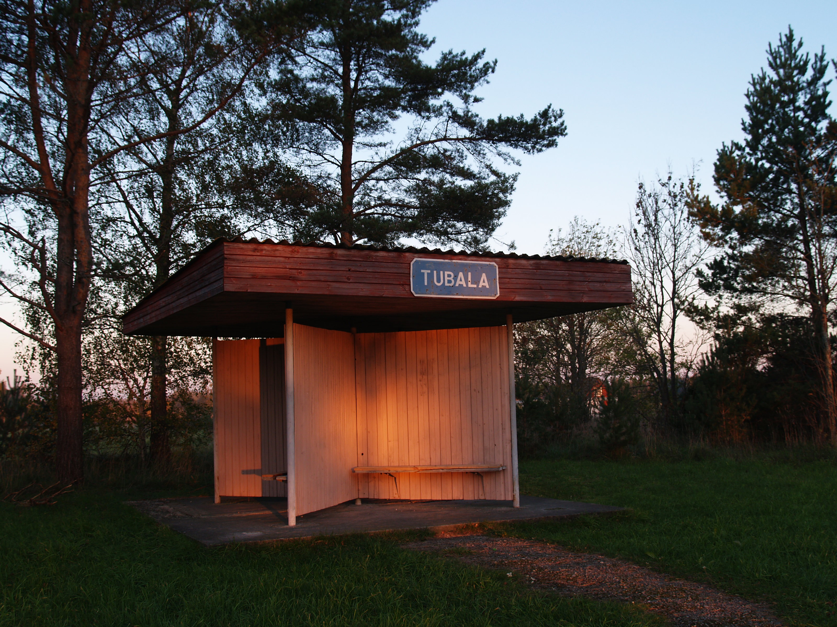 Tubala bussipeatus Kärdla–Käina maantee ääres.